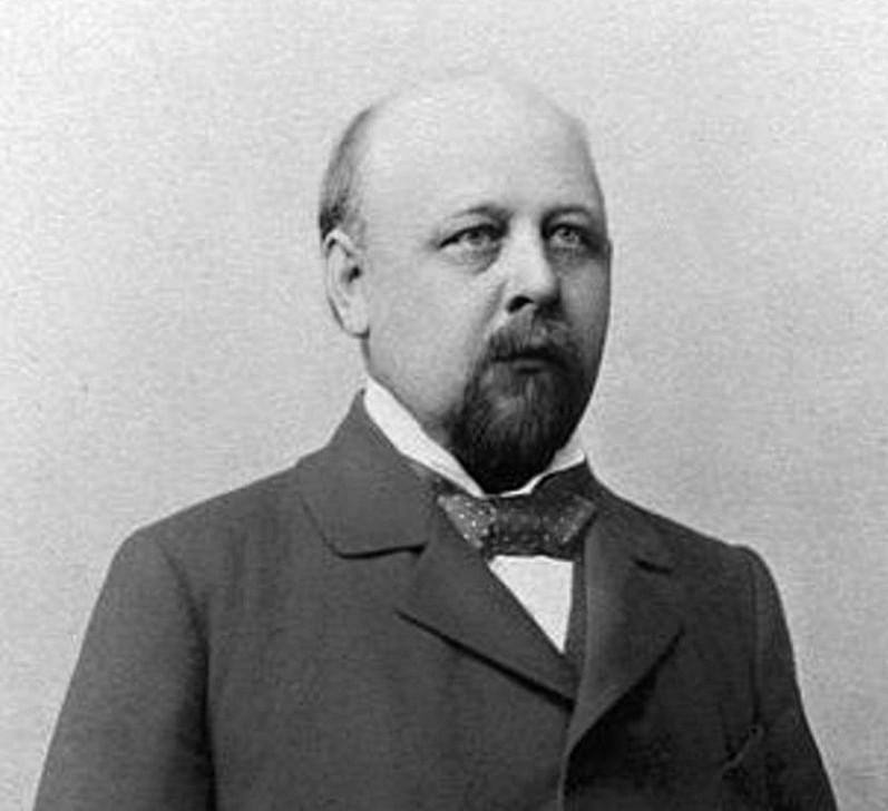 Karel Vojáček (1848-1899), moravský lékárník, politik a starosta města Prostějova